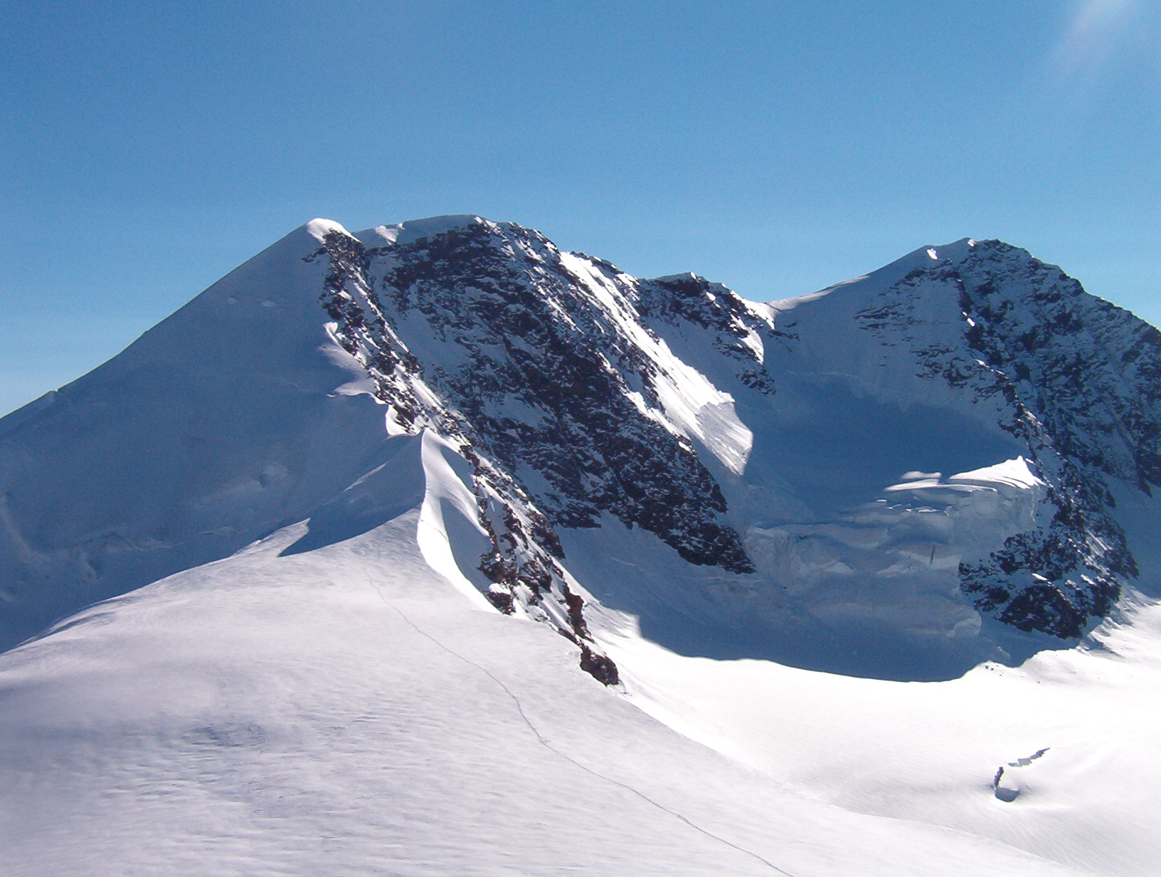 Lyskamm Occidentale ed Orientale dal colle del Felik - Alpi Pennine